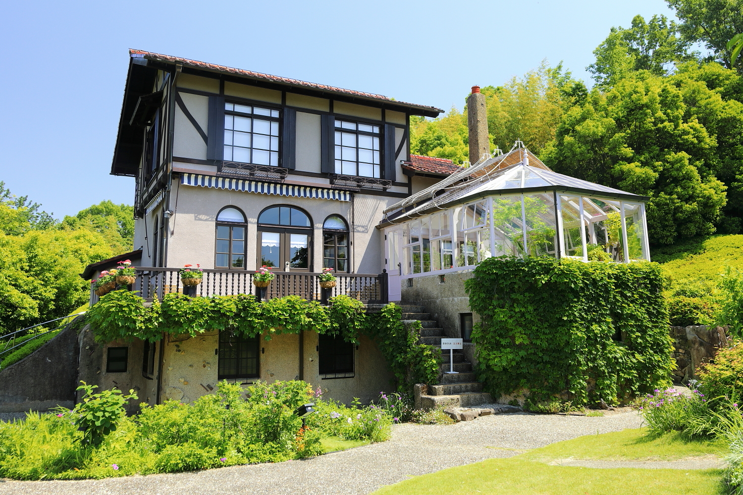 旧豊田喜一郎邸（豊田市池田町、2019年（令和元年）5月）